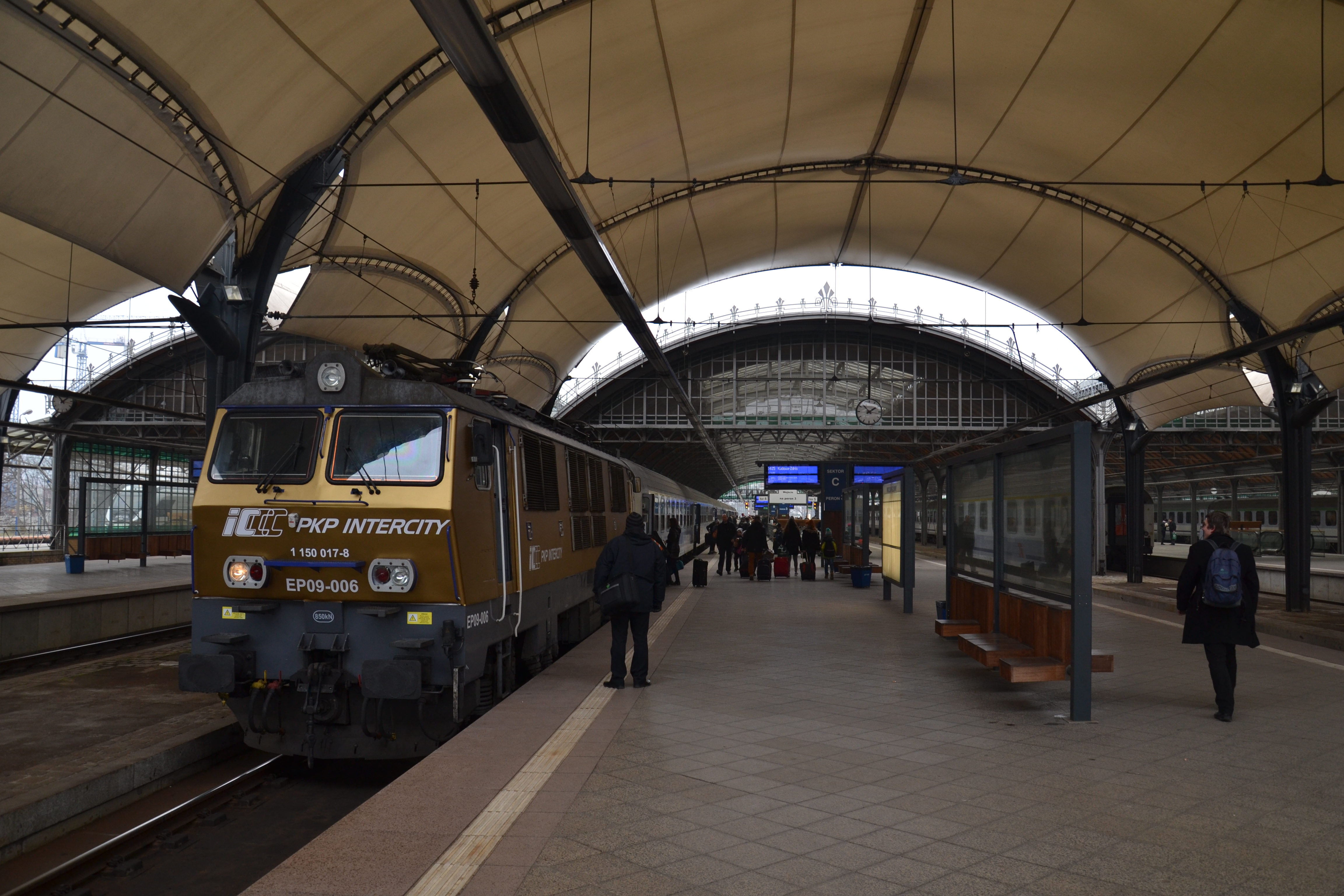 EP09-006 w złotej okleinie na dworcu Wrocław Główny (TLK Artus)